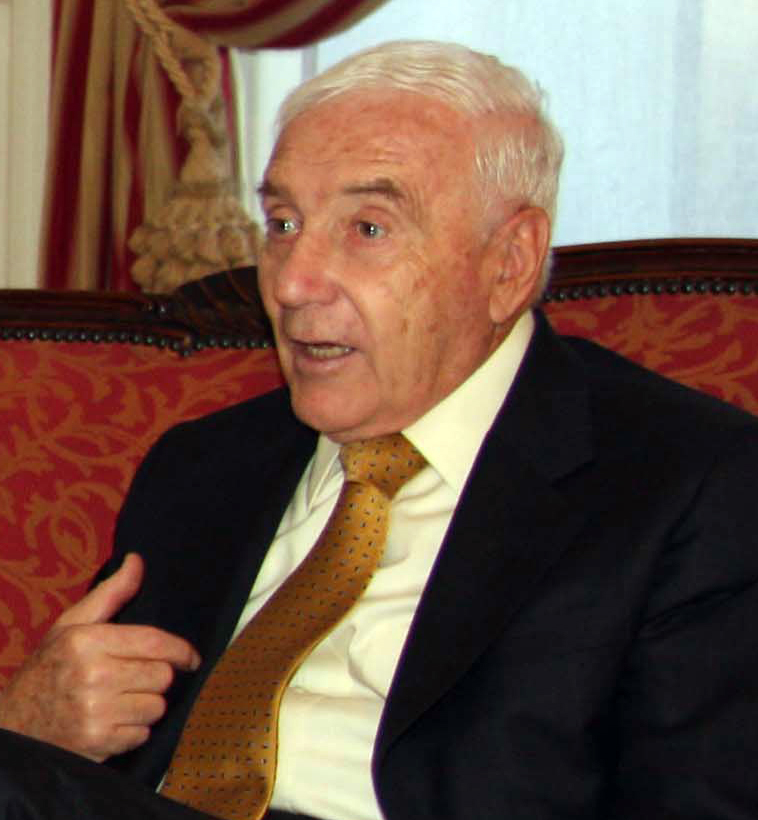 Buenos Aires - El Jefe de Gobierno de la Ciudad de Buenos Aires, Mauricio Macri, recibe en el Salon Blanco del Palacio Municipal al flamante embajador de Chile, Miguel Otero Lathrop. Foto Sandra Hernandez-gv/GCBA.